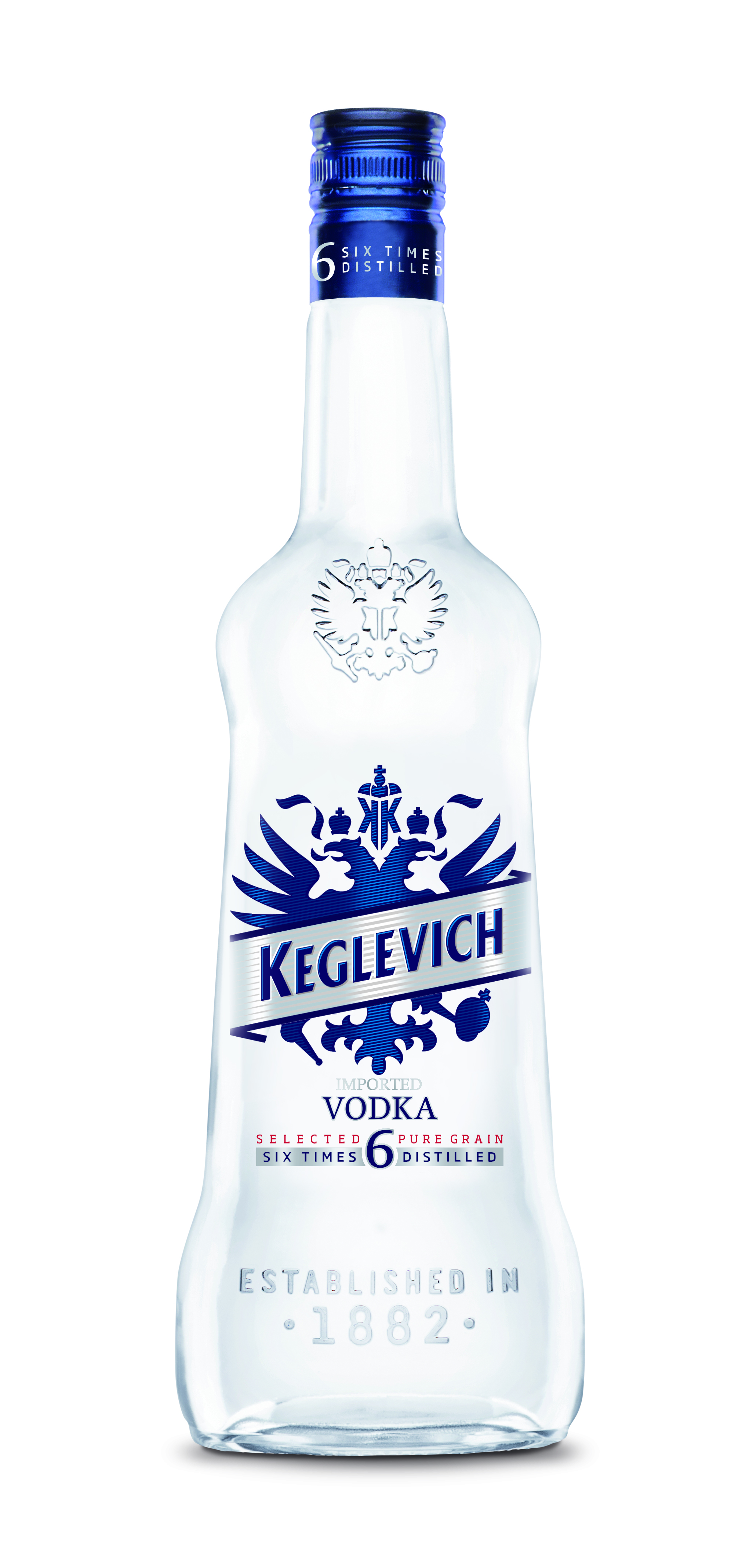 Nuova Keglevich Dry, bottiglia e liquido, rivoluzionati.